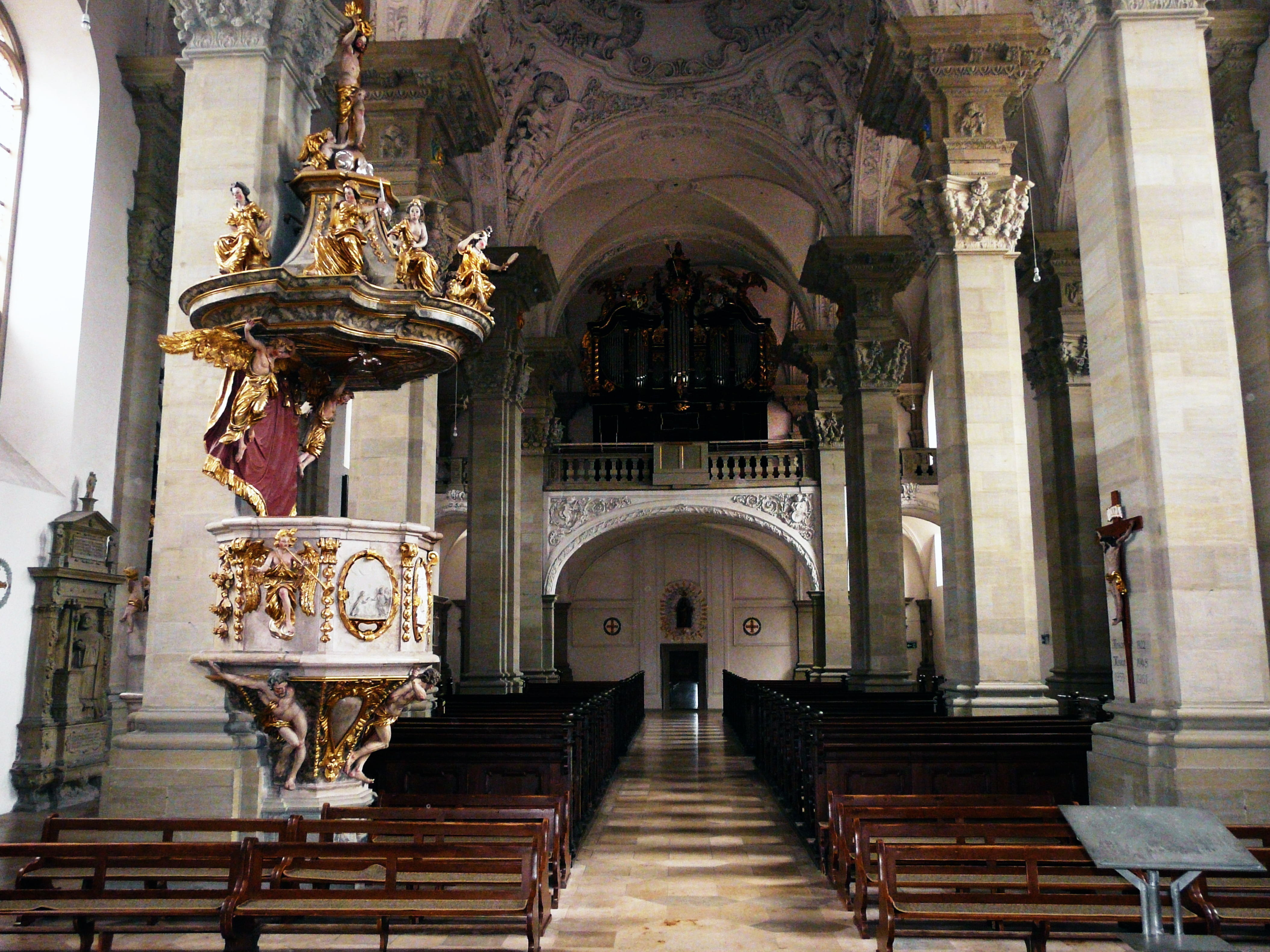 Церковь Св. Николая. Вид со стороны алтаря.